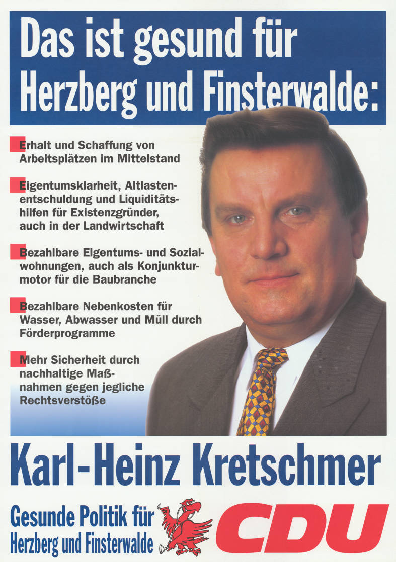 Das ist gesund für Herzberg und Finsterwalde: . Erhalt und Schaffung von Arbeitsplätzen im Mittelstand . Eigentumsklarheit, Altlastenentschuldung und Liquiditätshilfen für Existenzgründer, auch in der Landwirtschaft . Bezahlbare Eigentums- und Sozialwohnungen, auch als Konjunkturmotor für die Baubranche . Bezahlbare Nebenkosten für Wasser, Abwasser und Müll durch Föderprogramme . Mehr Sicherheit durch nachhaltige Maßnahmen gegen jegliche Rechtsverstöße Karl-Heinz Kretschmer Gesunde Politik für Herzberg und Finsterwalde Abbildung: Porträtfoto Plakatart: Kandidaten-/Personenplakat mit Porträt Objekt-Signatur: 10-033 : 226 Bestand: Landtagswahlplakate Brandenburg (10-033) GliederungBestand10-18: Landtagswahlplakate Brandenburg (10-033) » CDU Lizenz: KAS/ACDP 10-033 : 226 CC-BY-SA 3.0 DE